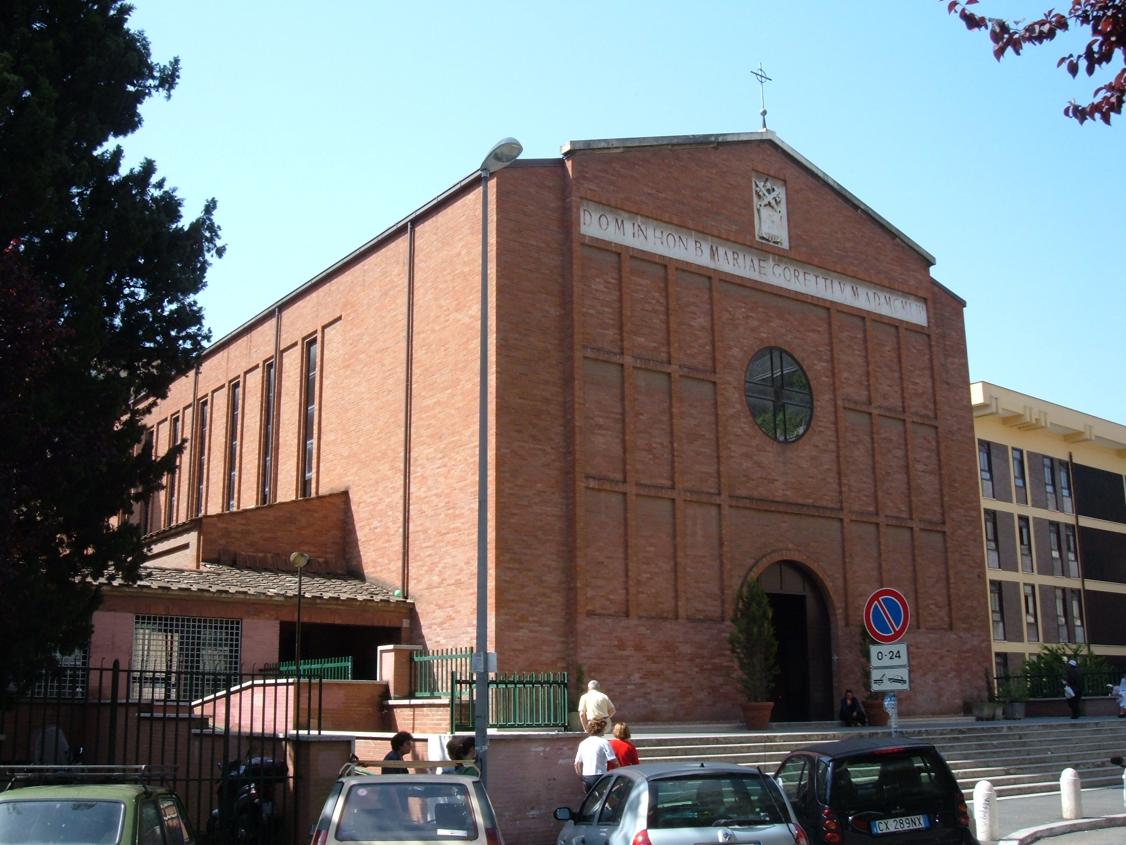 Chiesa di Santa Maria Goretti, a Roma, nel quartiere Trieste.